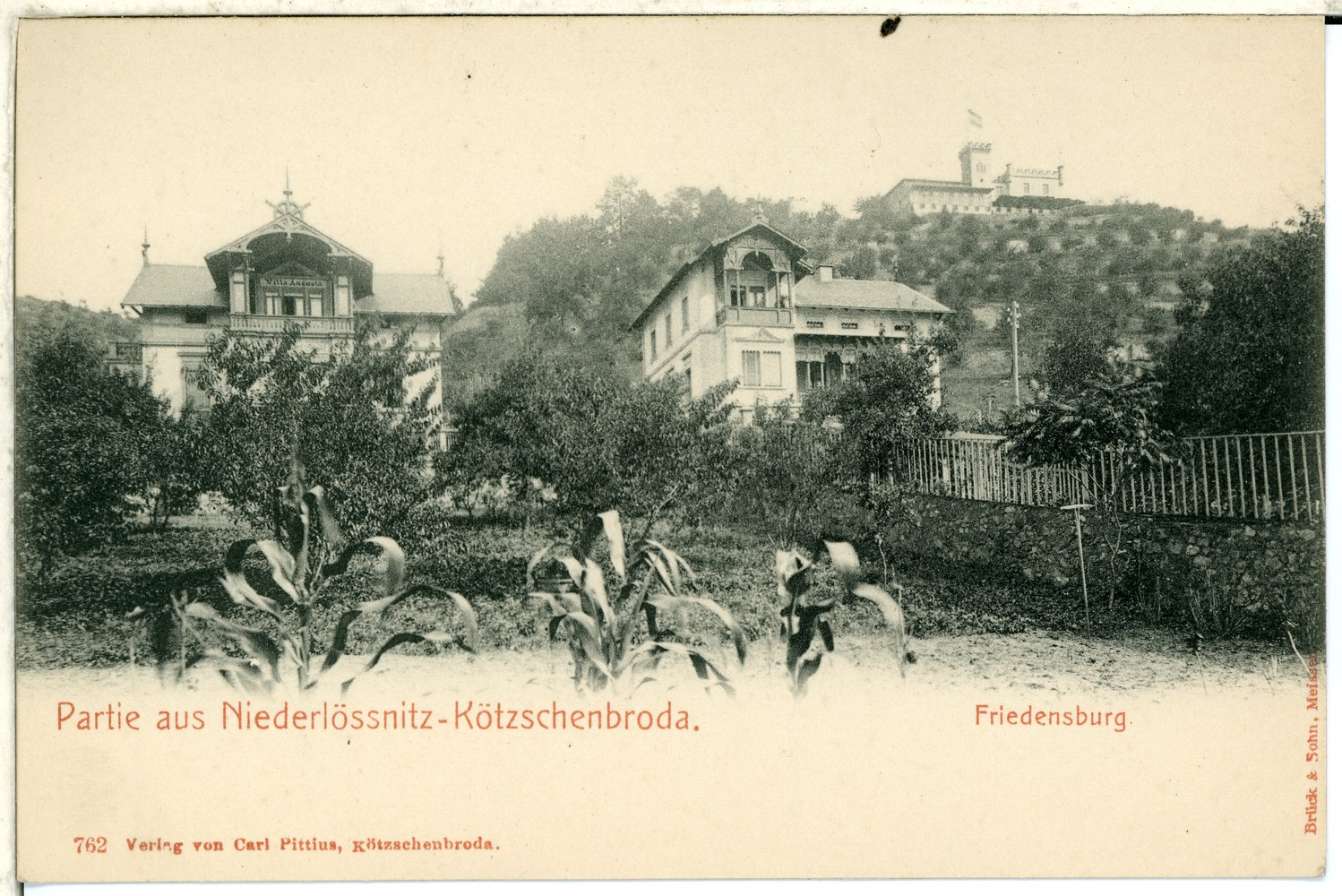 Niederlößnitz; Friedensburg This postcard is from publisher Brück & Sohn in Meißen ( postcard has a unique number 00762 and is available in a higher resolution at the publisher. This images was uploaded in a cooperation project between Wikipedians and the publisher.